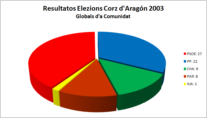 Aragonés: Grafico d'as elezions á Corz d'Aragón de la añada 2003